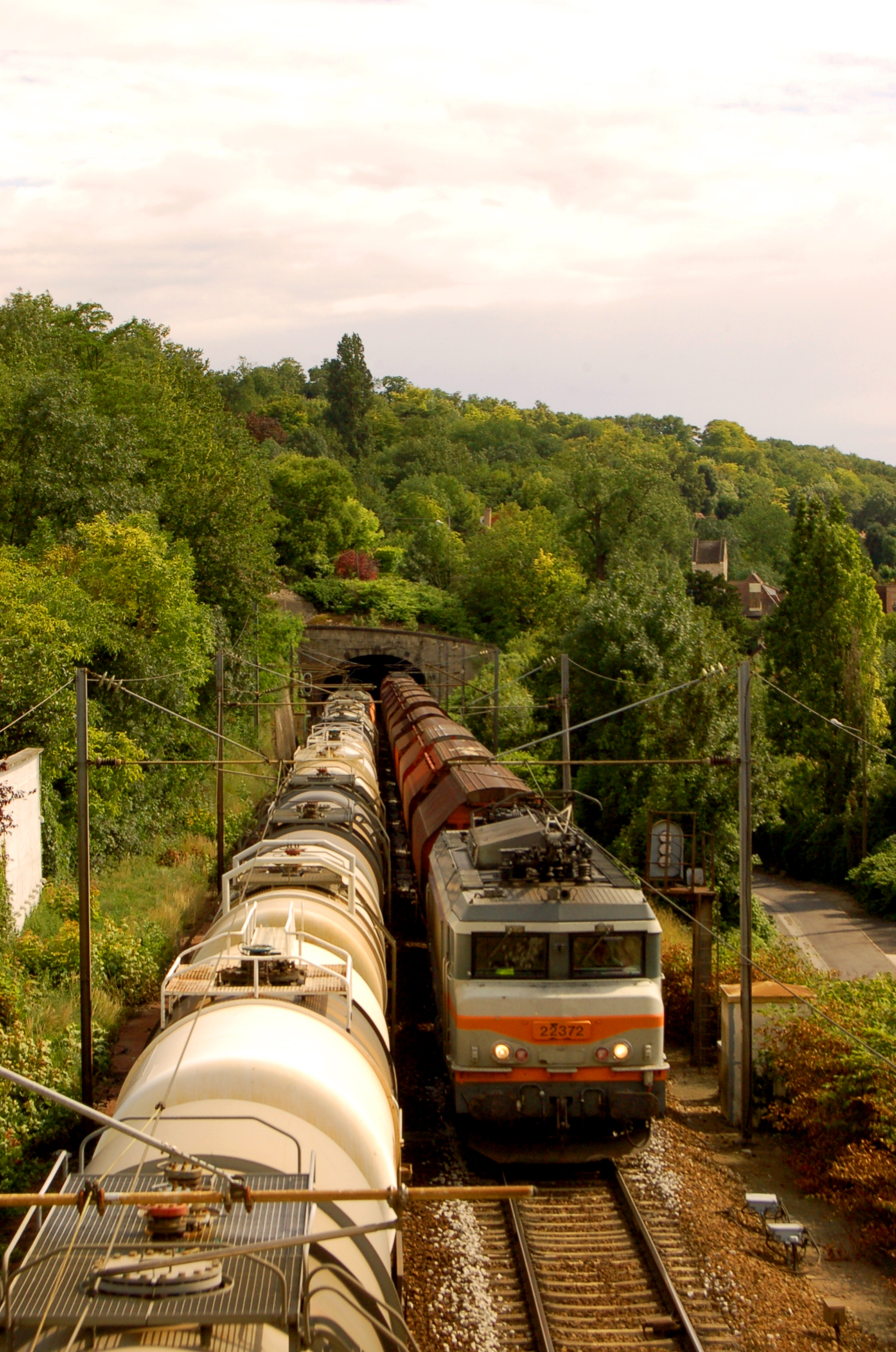 Une photo qui illustre le trafic intense sur la ceinture complémentaire, ici au niveau de Chennevières sur Marne, dans le Val de Marne. On aperçoit au fond le tunnel de Chennevières, qui longe la Marne.